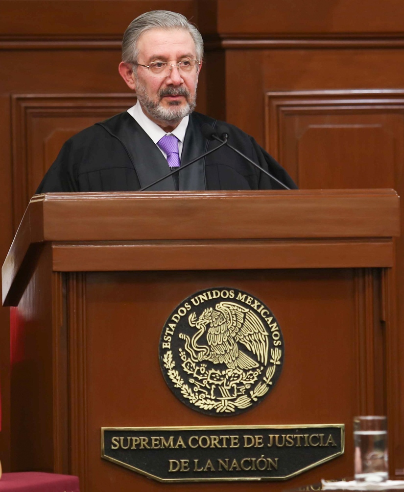 El Presidente Enrique Peña Nieto asistió al Informe Anual de Actividades del Ministro Presidente de la Suprema Corte de Justicia de la Nación, Luis María Aguilar Morales. |Source=Informe Anual del Presidente